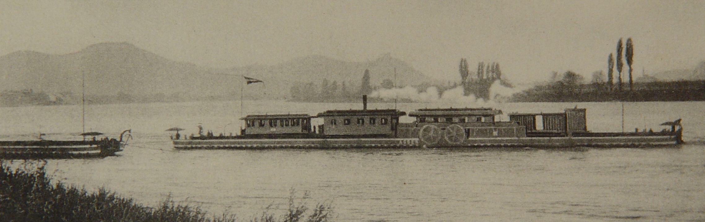 Bonn–Oberkassel. Ponte "Sieg" der Rheinischen Eisenbahn nahe Oberkasseler Ufer (1870 - 1914). Train ferry